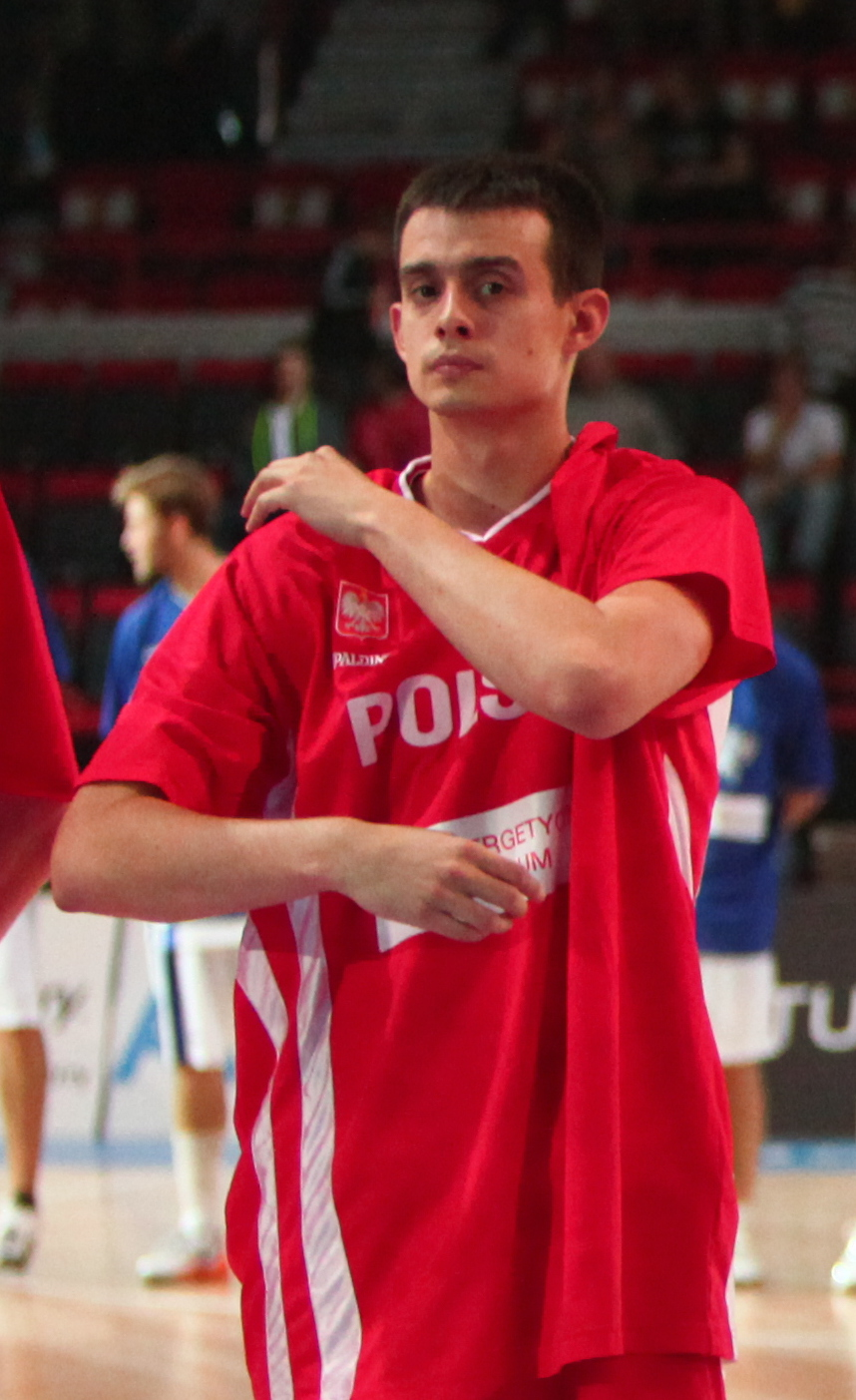 Reprezentacja Polski przed meczem z Finlandią w kwalifikacjach do Eurobasketu 2013.